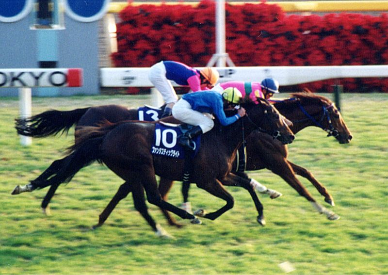 ファンタスティックライト 撮影日: 2000年11月26日 撮影場所: 東京競馬場 撮影者: Goki